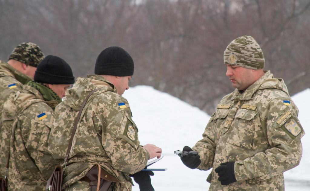 Василий Зубанич с бойцами 10-й отдельной горно-штурмовой бригады